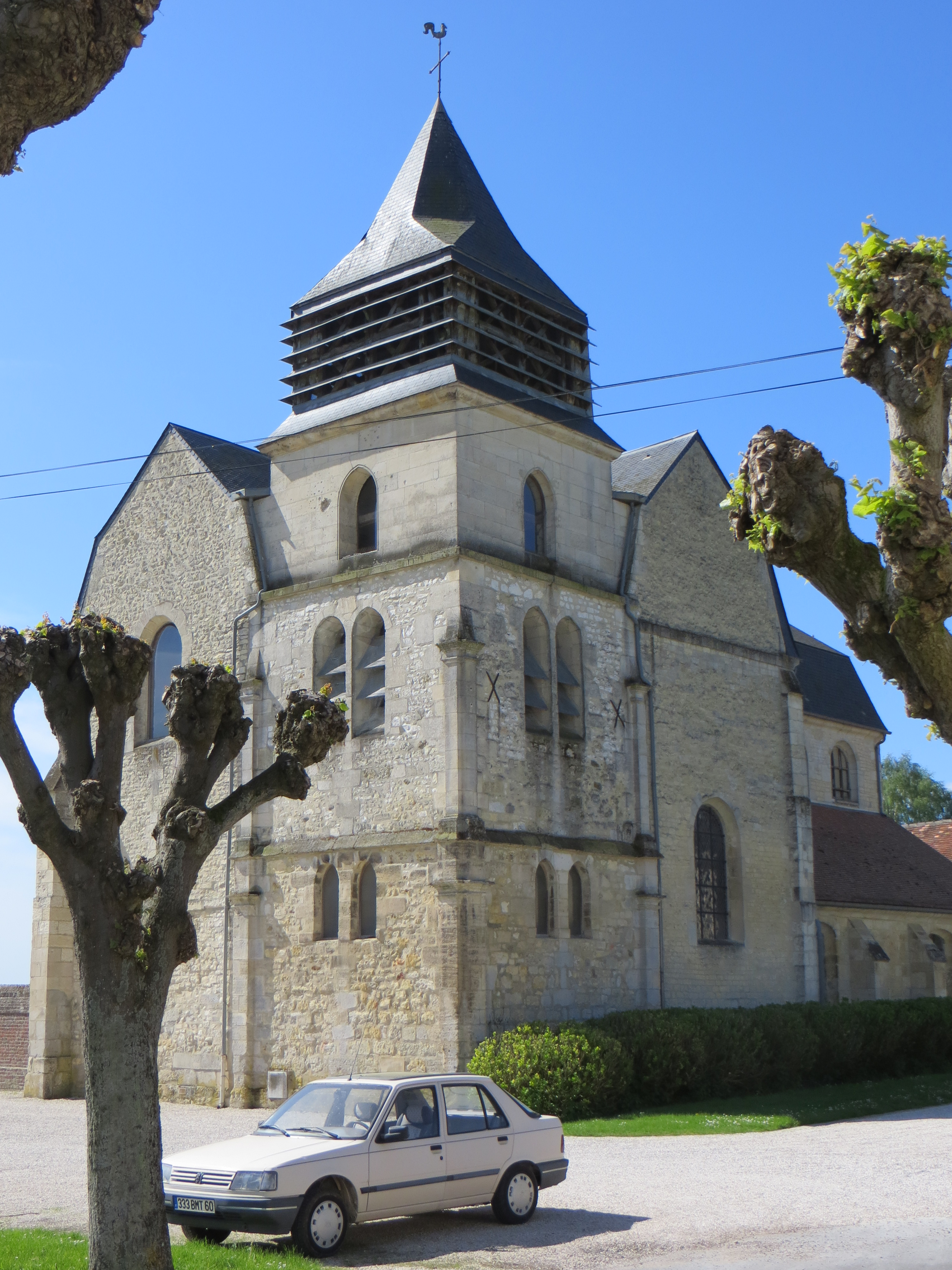 Vue générale de l'église